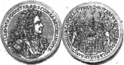 Medaille von 1702 des Grafen von Beichlingen (Kupferstich aus Köhlers Münzbelustigung Band 12, S. 273)